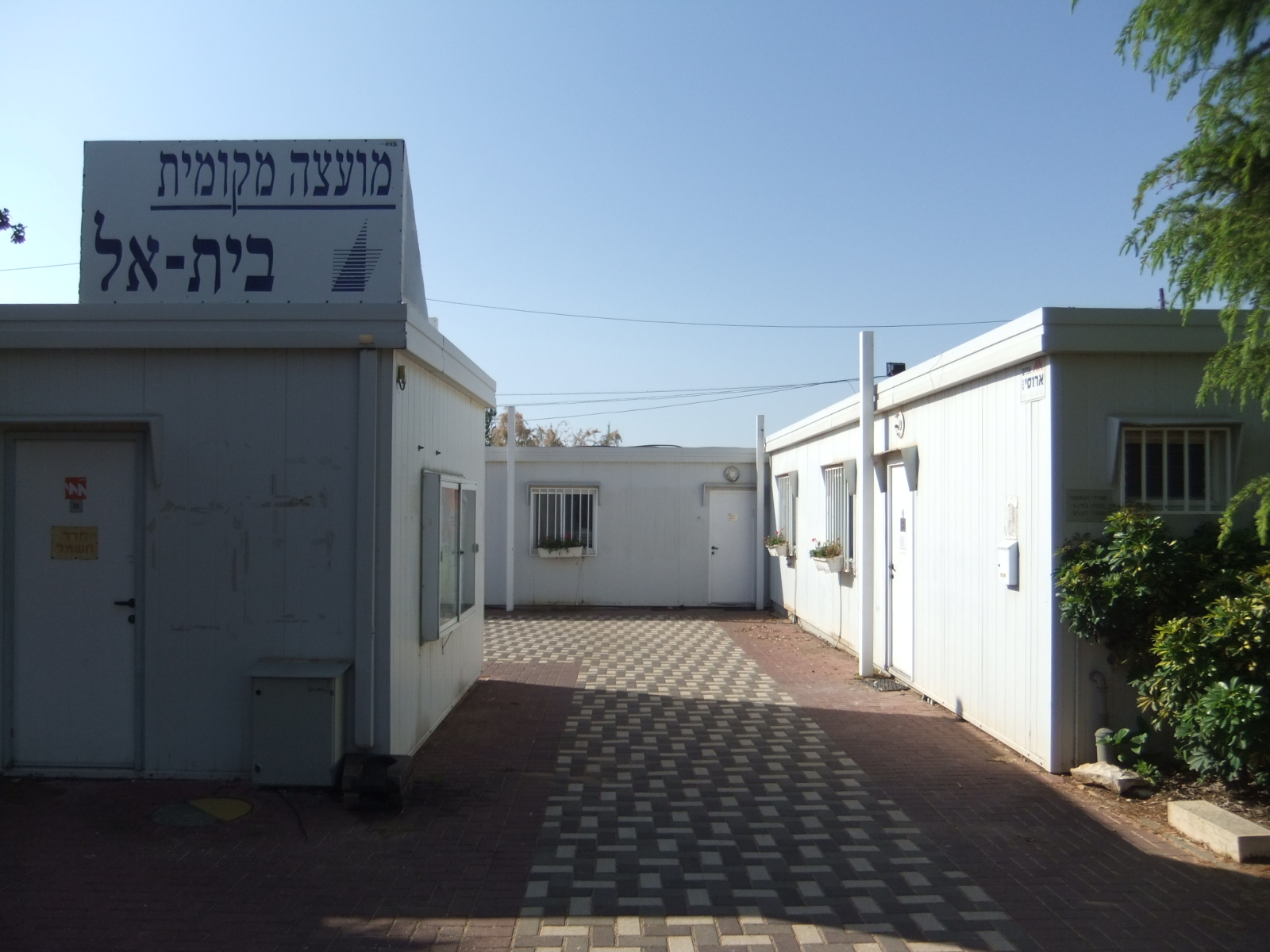 Beit El municipal offices